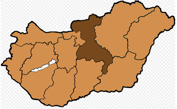 Mappa dell'arcidiocesi cattolica di Vac, in Ungheria. Lavoro personale eseguito da questa immagine di Commons.